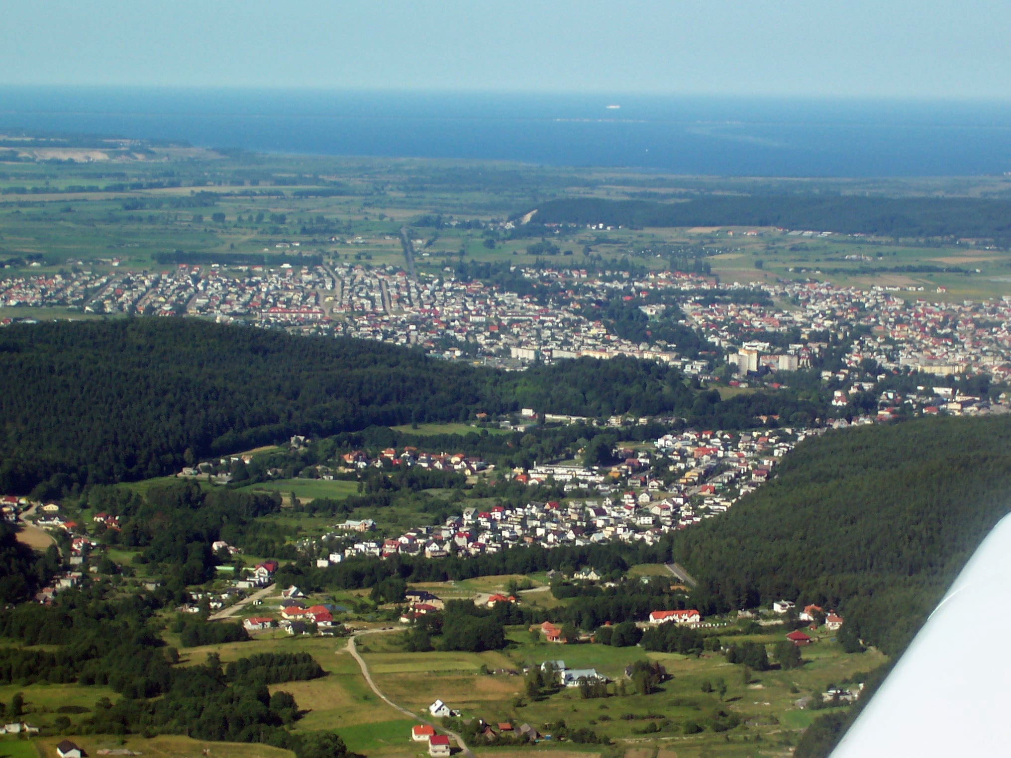 Rumia z lotu ptaka w 2004 roku. Na pierwszym planie ul. Łąkowa w dzielnicy Szmelta. W dalekim tle widać prom StenaLine idący za Półwyspem Helskim.